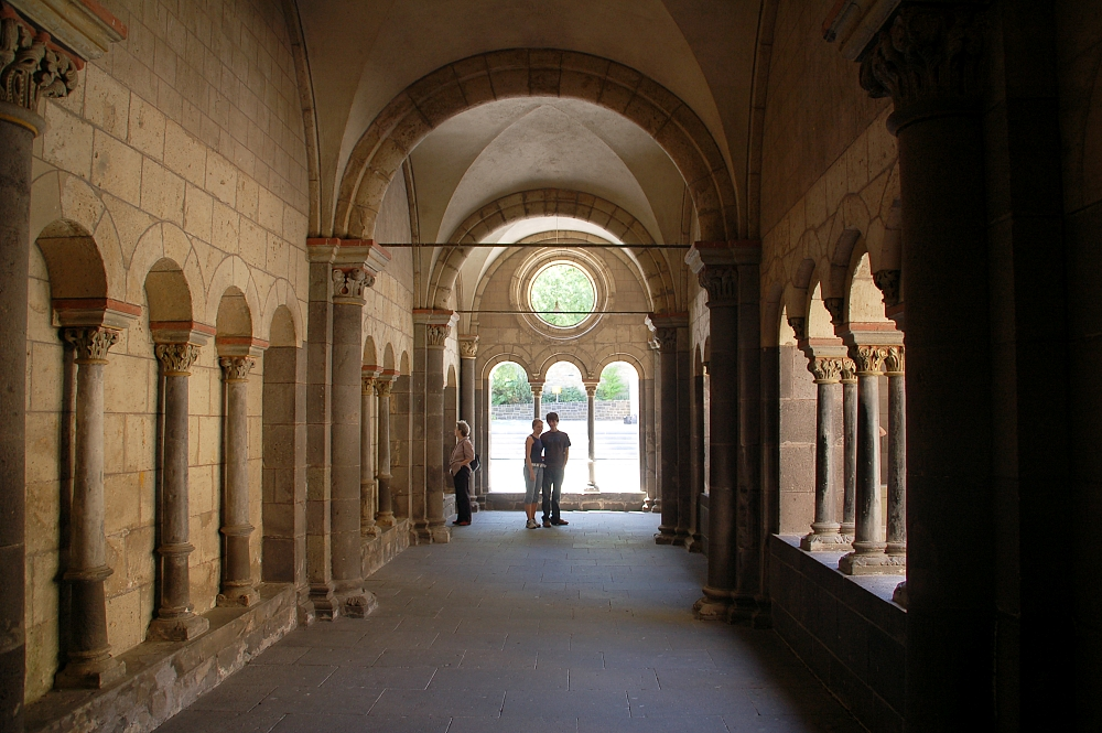 Maria Laach, Eifel, Germany